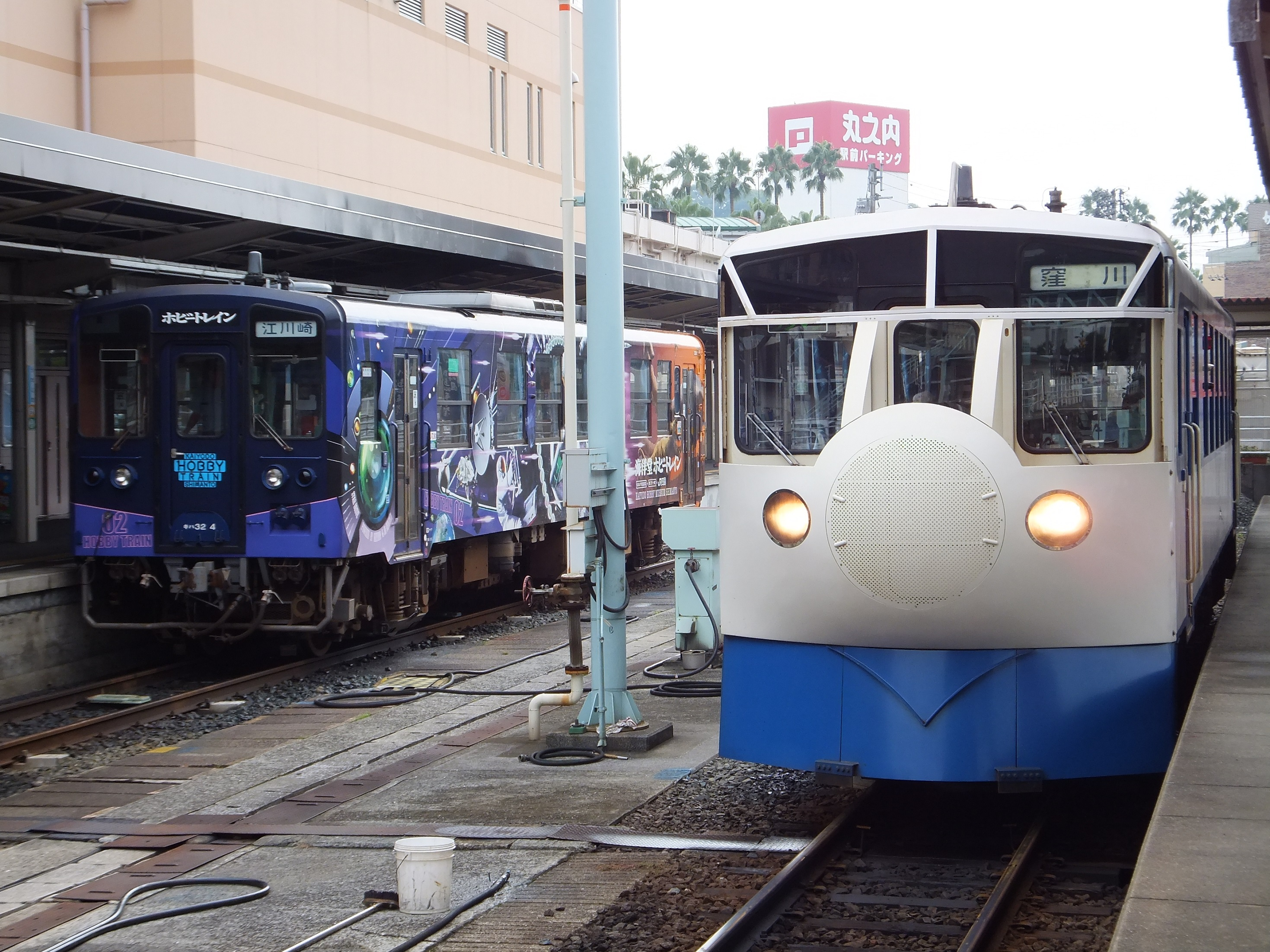 宇和島駅に停車中のJR四国 鉄道ホビートレイン（右）と海洋堂ホビートレイン（左）